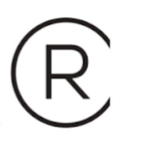 中文（香港）: 2018年版共和委員會新標誌，由一個大楷「R」字母與一個大楷「C」字母組成。大楷「C」字母亦可視為一個不完整的圓圈。